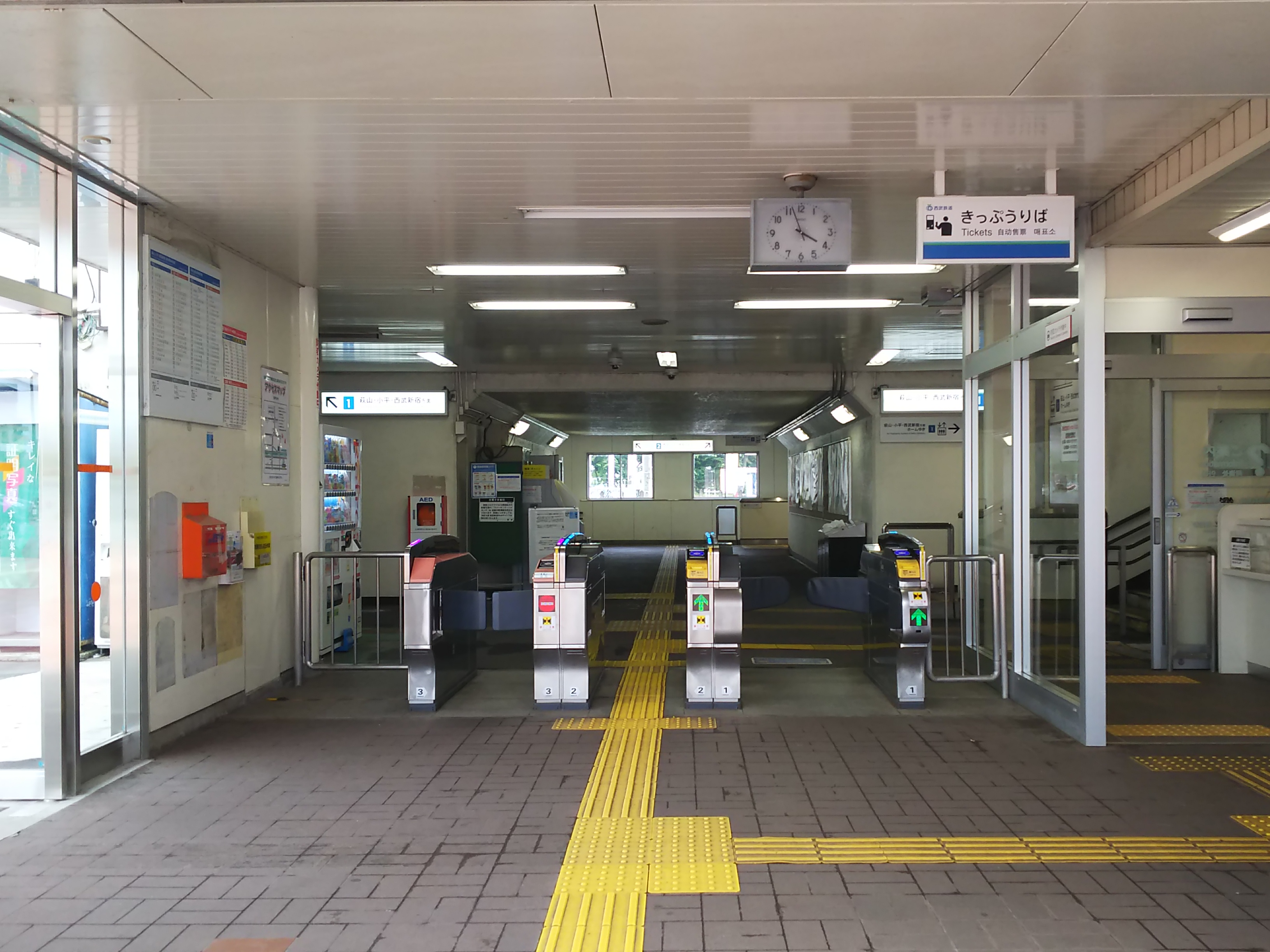 西武拝島線武蔵砂川駅改札口